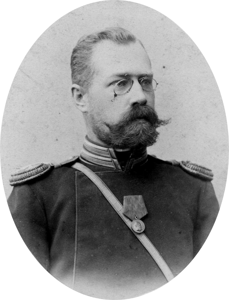 Карл Владимирович фон-Фрейман, русский генерал, герой Первой мировой войны.